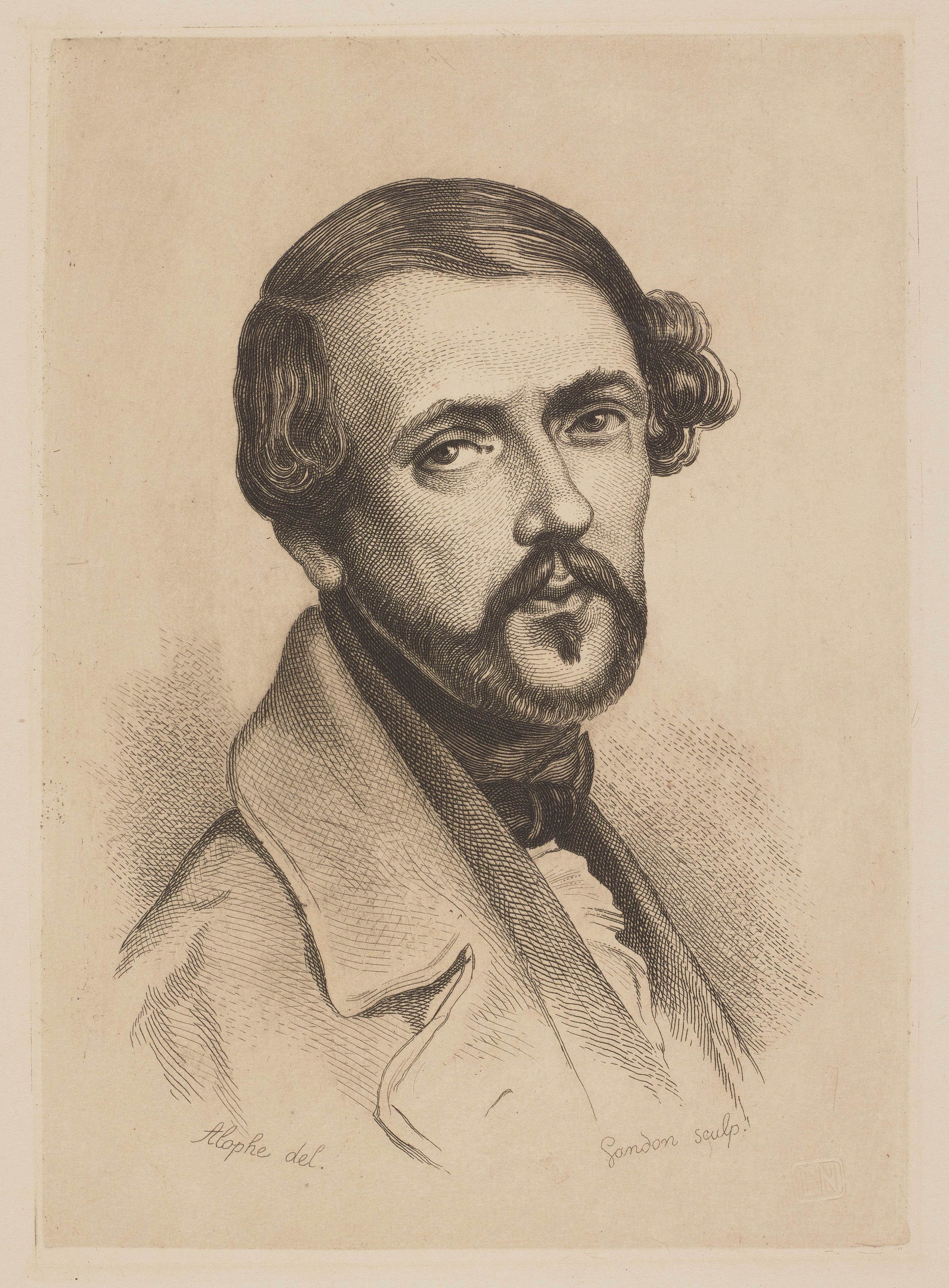 James Pradier